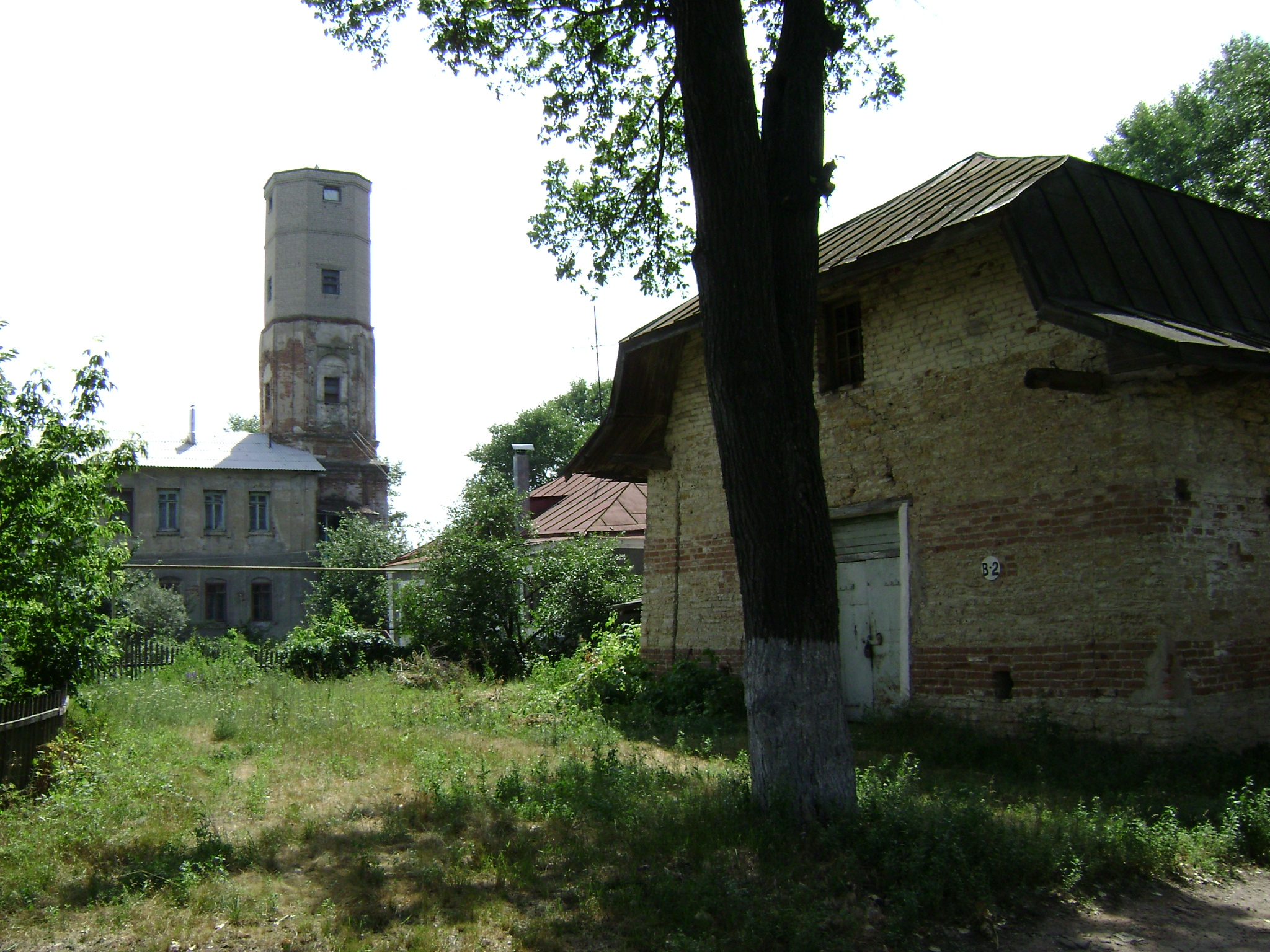 Покровская церковь и амбар в Горожанке (Рамонский район, Воронежская обл.)